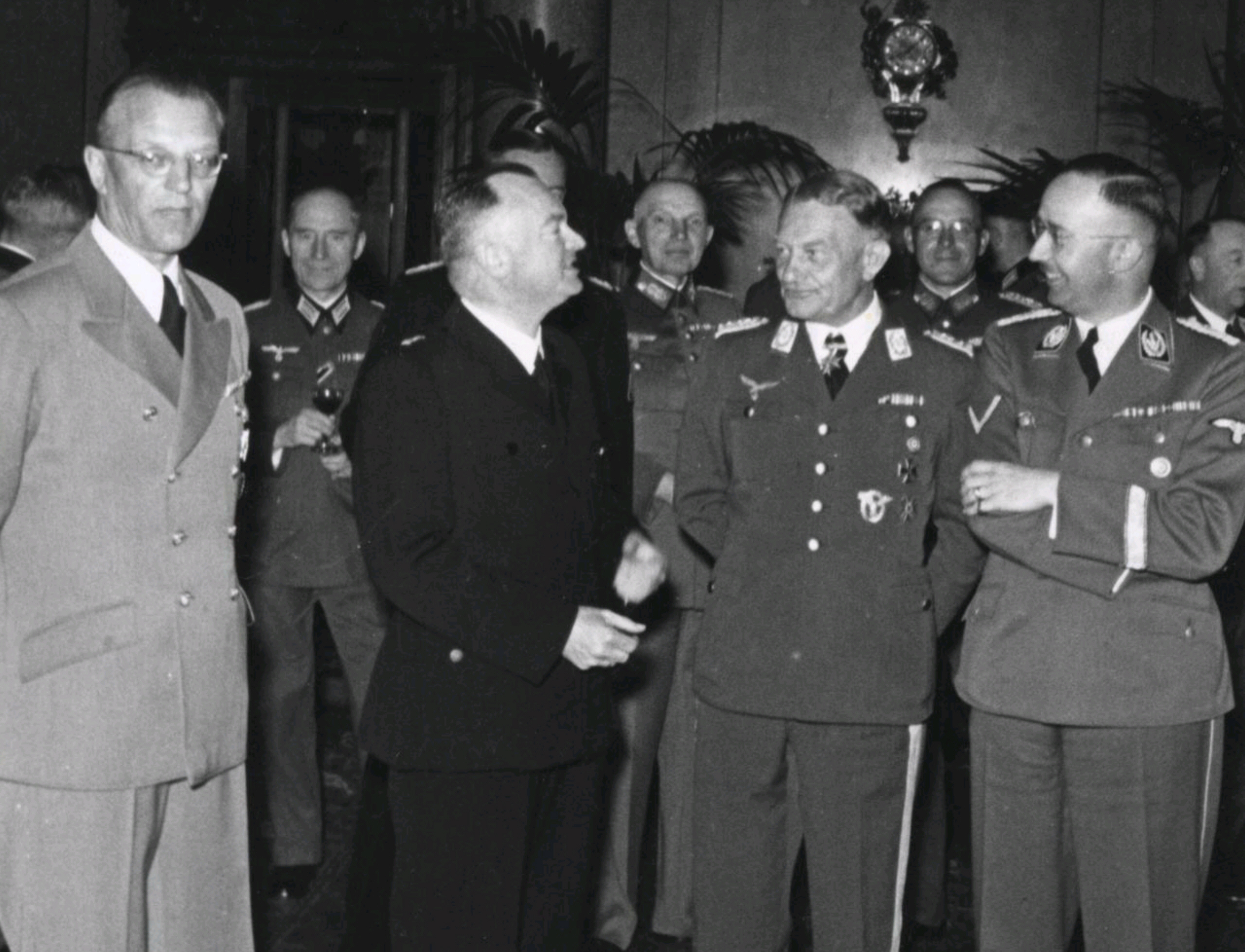 Anton Mussert, leider van de Nationaal-Socialistische Beweging in Nederland, Reichsführer Himmler en Rijkscommandant Dr. Seyss-Inquart worden door de Generaal van de Luchtmacht Fr. Christiansen ontvangen. Nederland, 19 mei 1942.